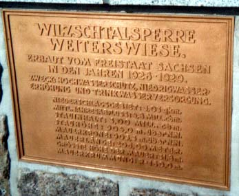 Gedenktafel an der Sperrmauer der Talsperre Carlsfeld